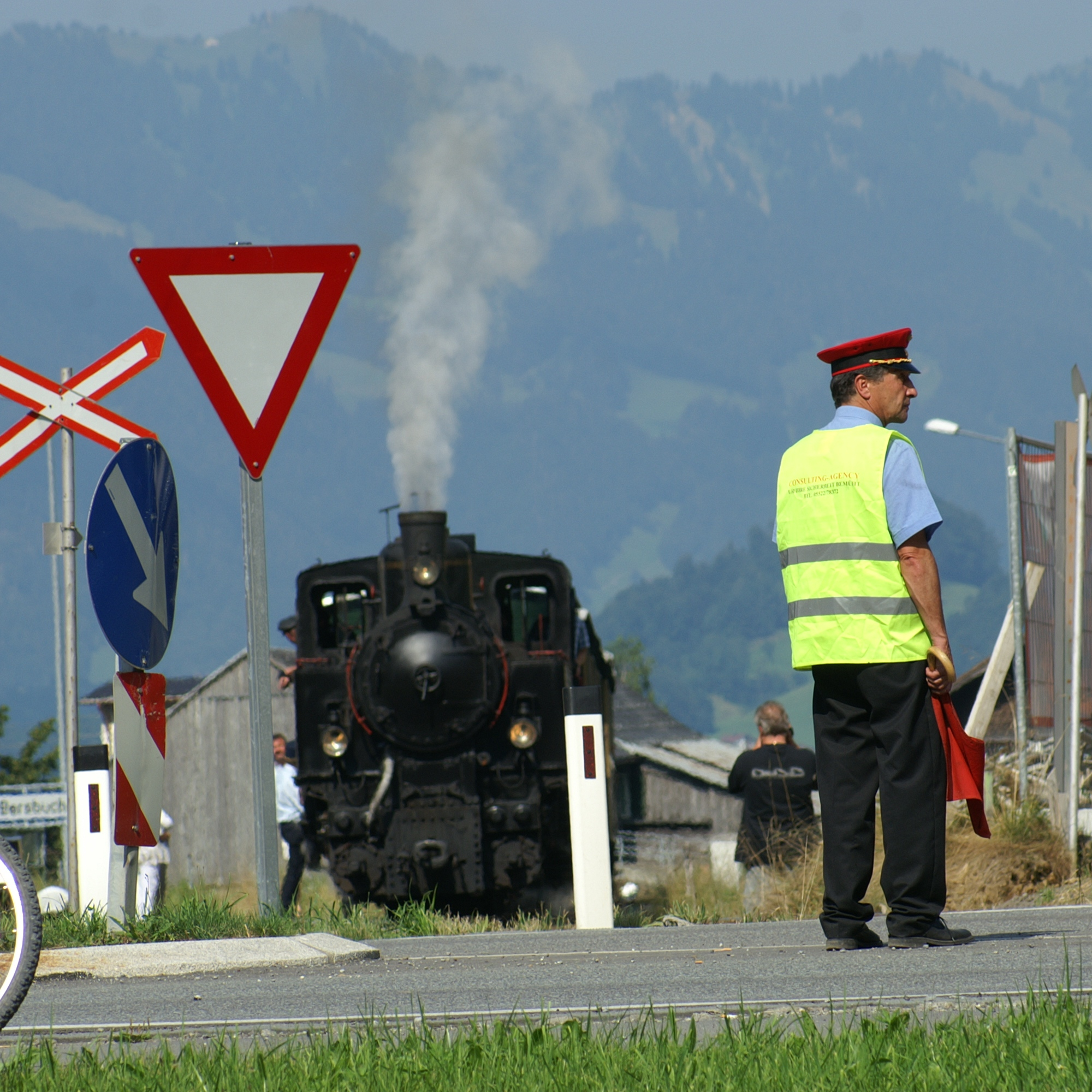 Schwarzenberg Bahnhof mit Museumsbahn "Wälderbähnle".